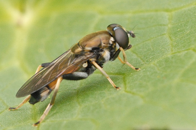 Xylota sylvarum from Commanster, Belgian High Ardennes .